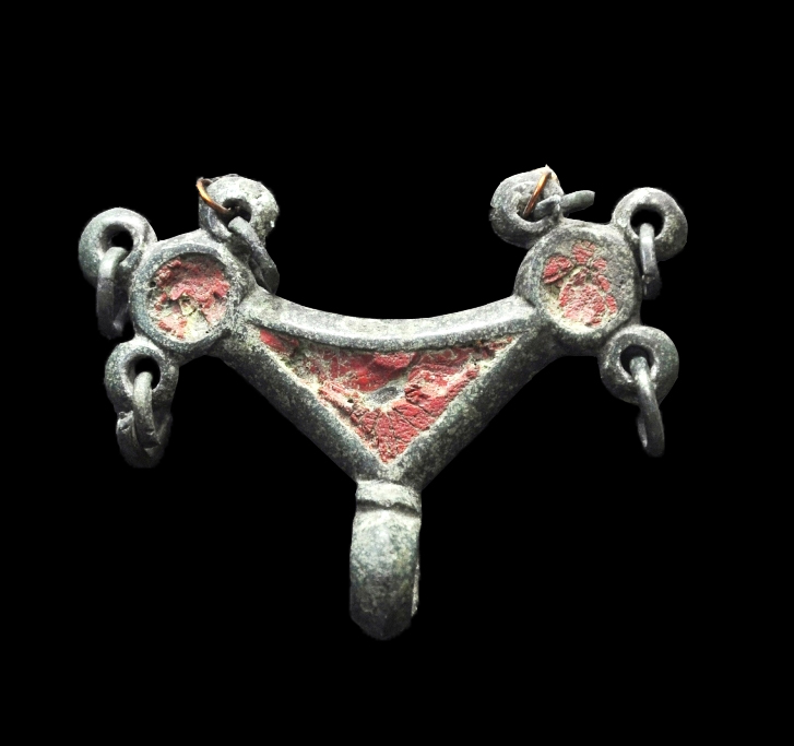 Падвеска-лунніца з выемкавай чырвонай эмаллю. І-ІІІ стст. Бронза, эмаль. Селішча Адаменка Быхаўскага раёна Магілёўскай вобласці. Раскопкі Л.Д. Побаля